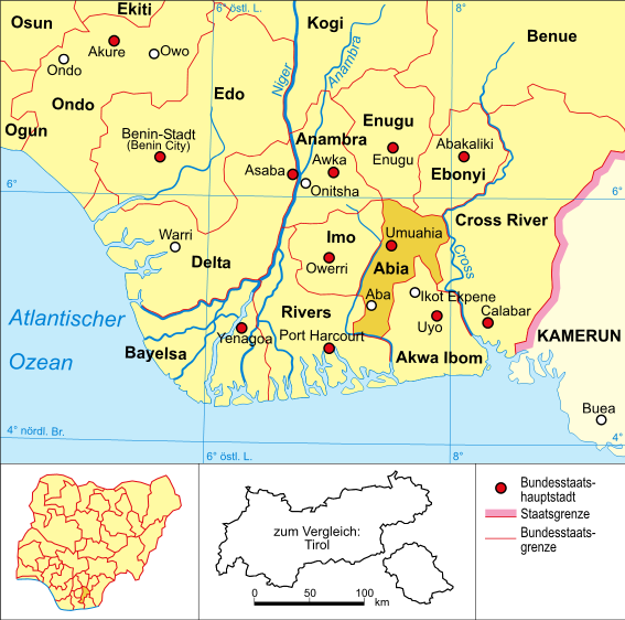 Politische Karte Nigerias (Bundesstaat Abia hervorgehoben)